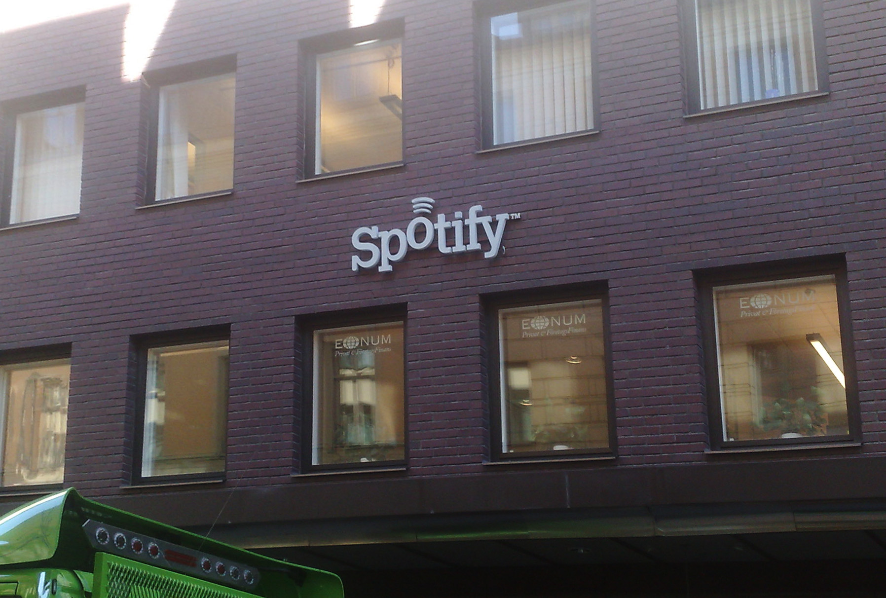 Spotifys huvudkontor på Humlegårdsgatan